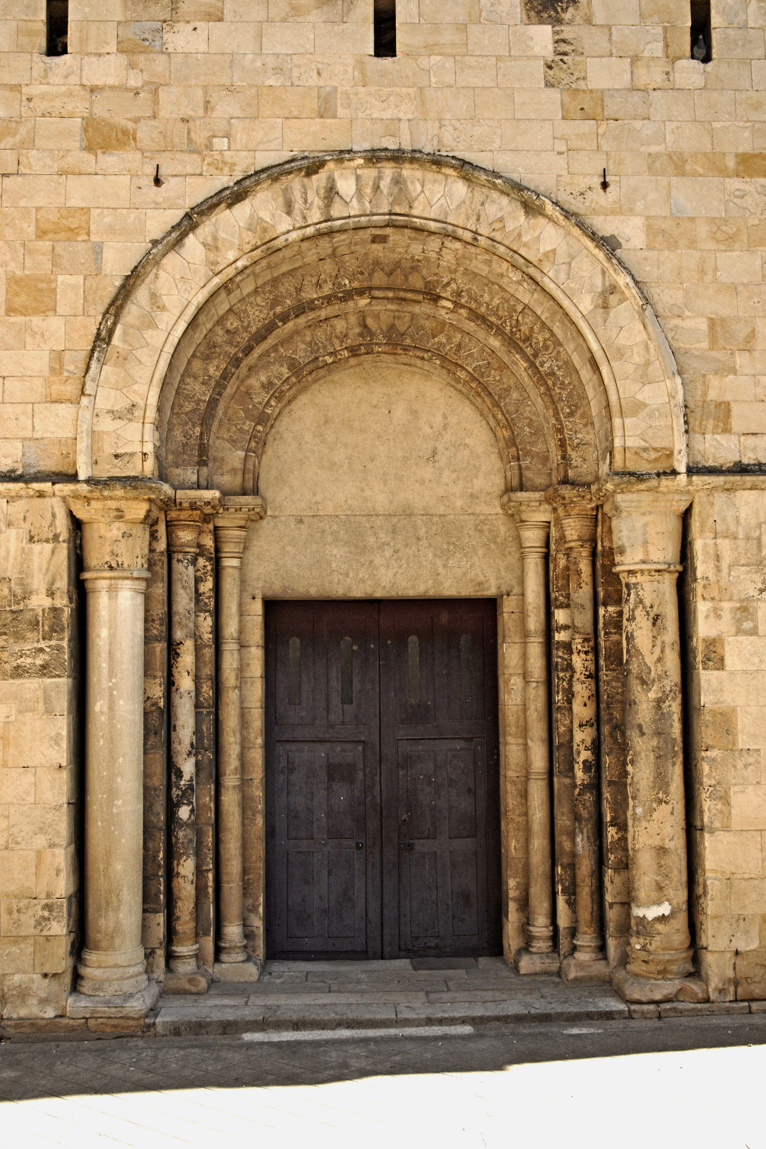 Saint-Etienne Nevers, Hauptportal